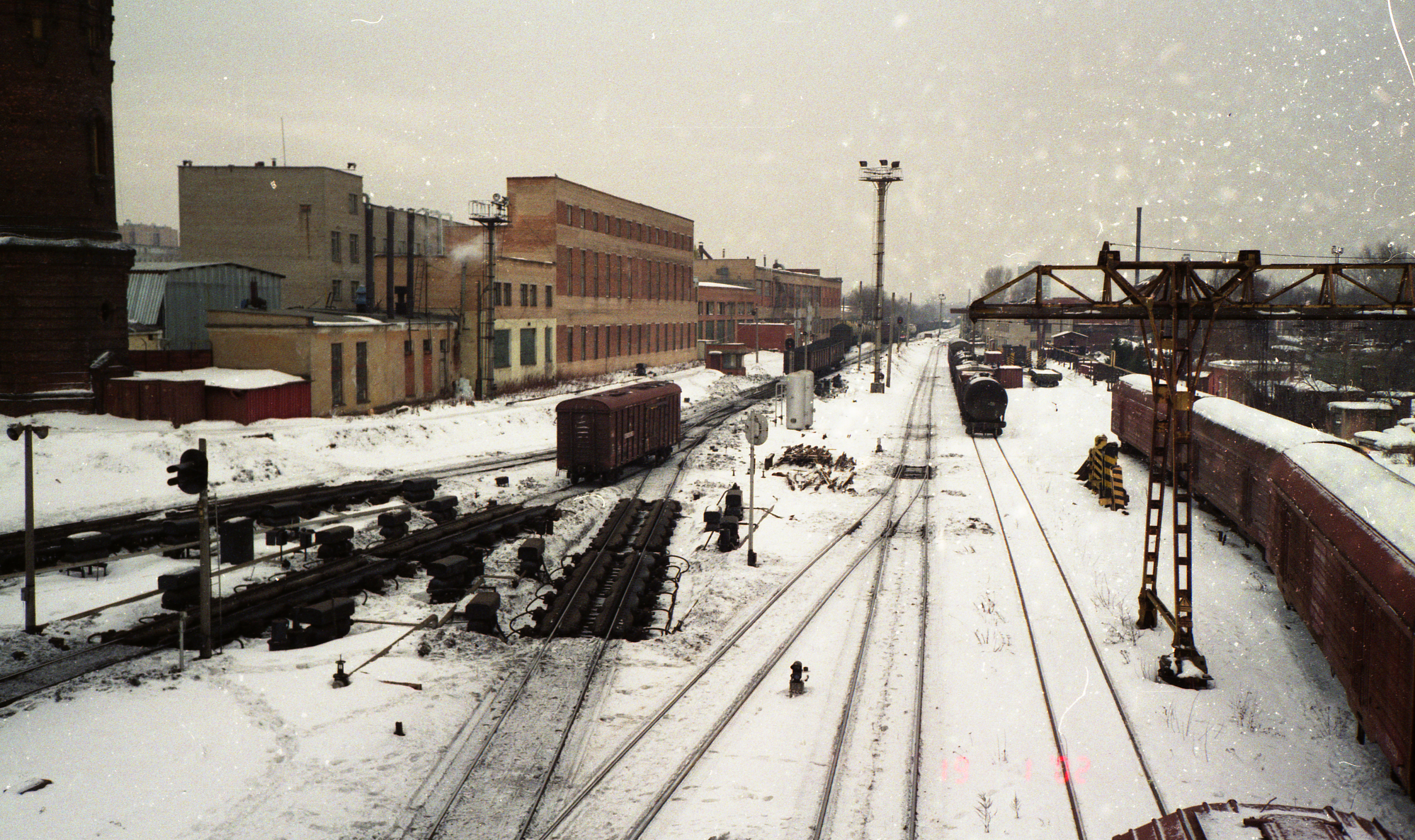 Moscow. Olympus mju-II camera, Konica 200